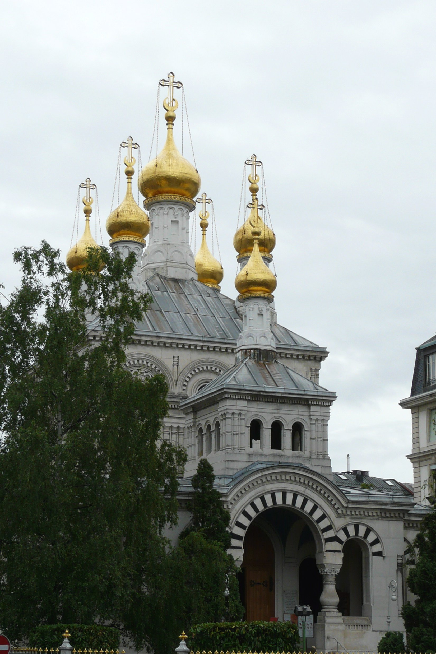 Église orthodoxe russe de Genève Juillet 2008 Emmanuel BRUNNER (manu25)